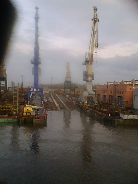 Стапель